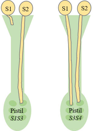 En auto-incompatibilité gamétophytique, si l'un des deux allèles S présents dans le pistil est le même allèle dans le grain de pollen, il y a réponse incompatible et la croissance du tube pollinique est arrêtée (pistil S1S3 avec pollen S1). Il y a compatibilité si les allèles du pollen et du pistil diffèrent (pollen S2 avec pistil S1S3, pollen S1 ou S2 avec pistil S3S4).